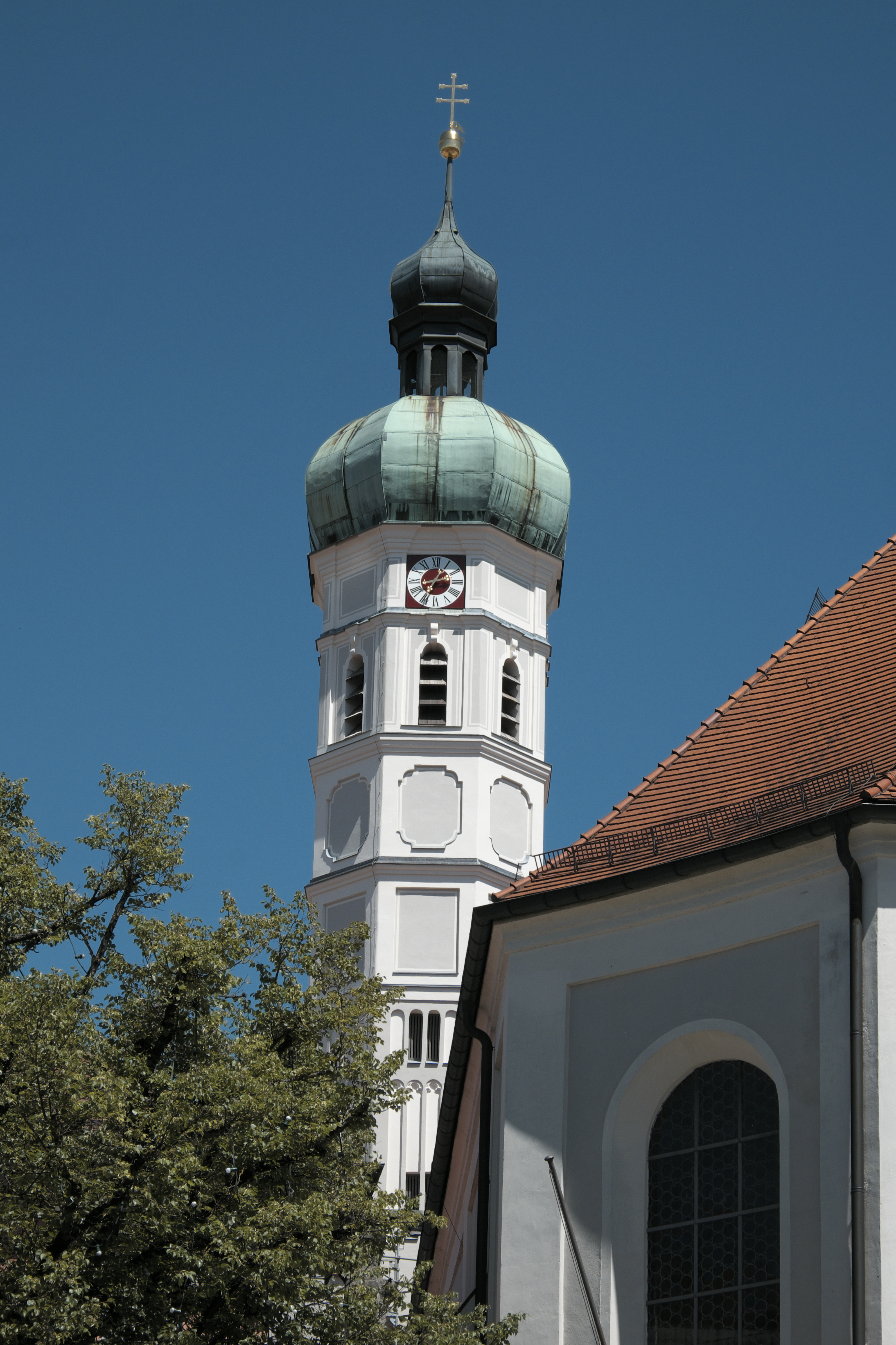 Katholische Pfarrkirche St. Jakob in Dachau (Bayern, Deutschland), Turm mit Zwiebelhaube